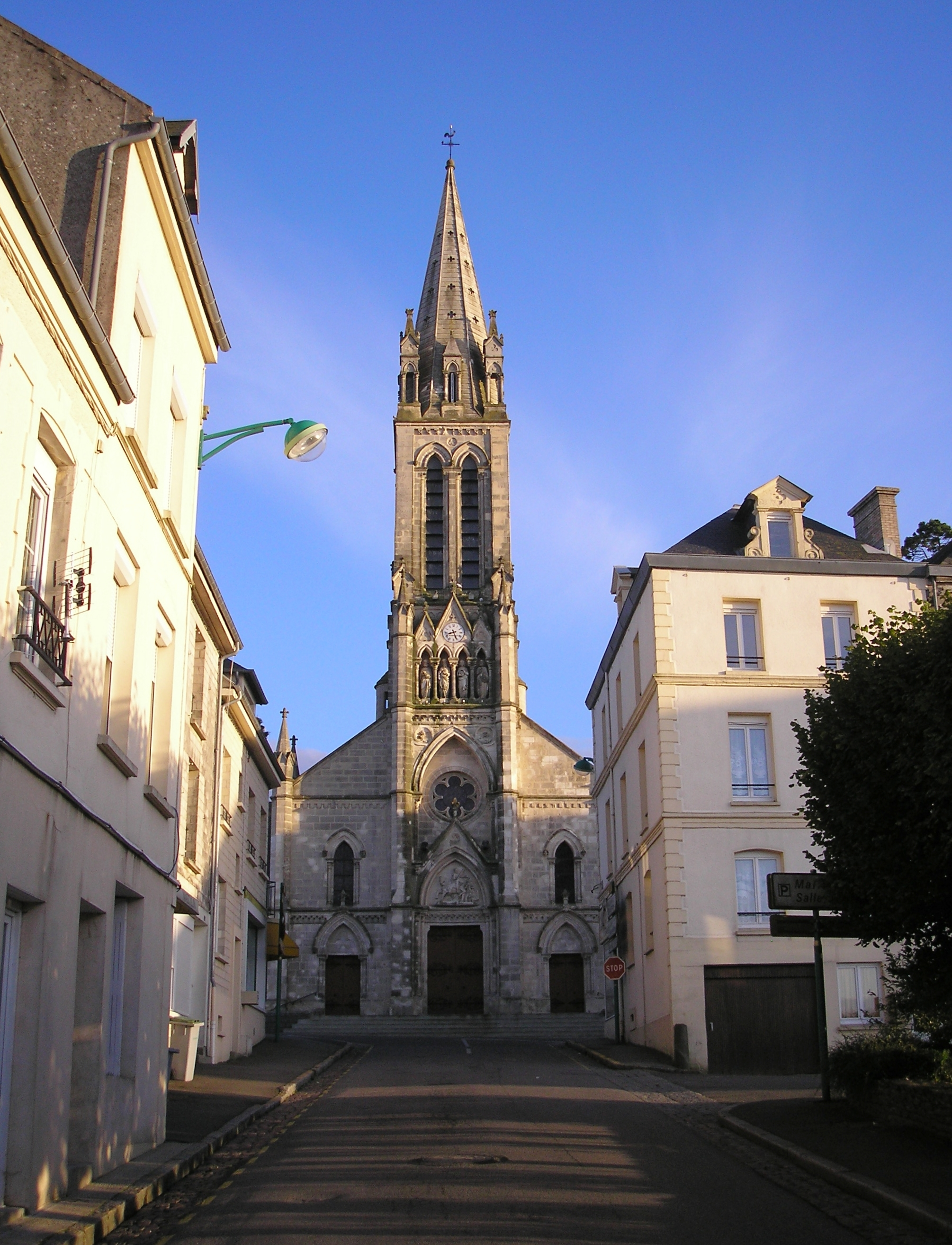 Caumont-L'Eventé (Normandie, France). Église Saint-Clair-et-Saint-Martin.